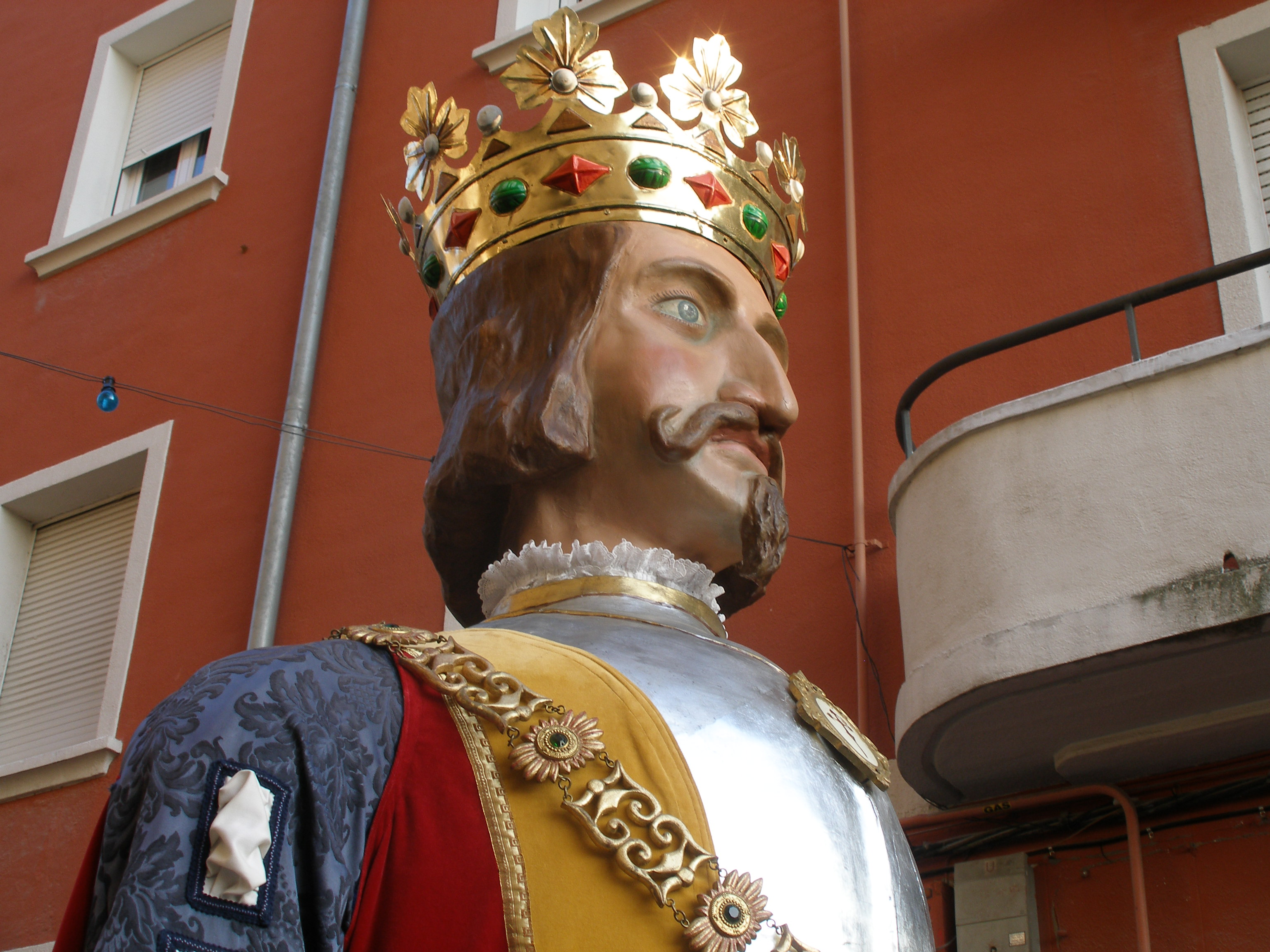 Iruñeko erraldoia